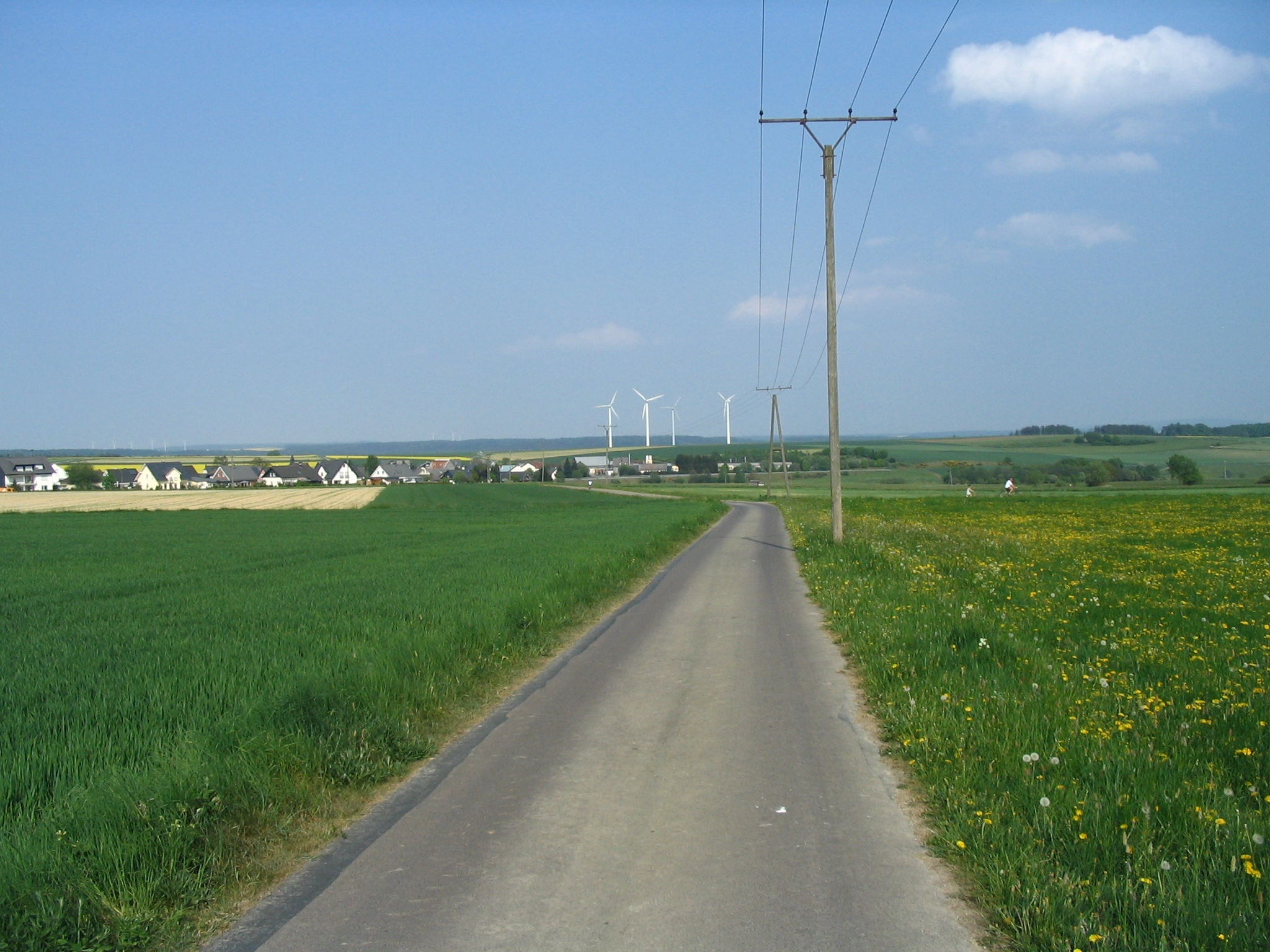 Biebertalrundweg bei Wüschheim